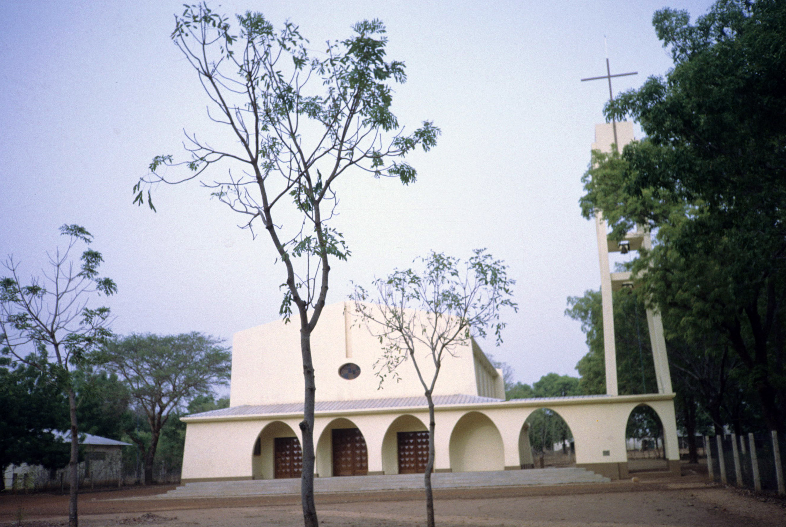 Kathedrale in Pala, Tschad.